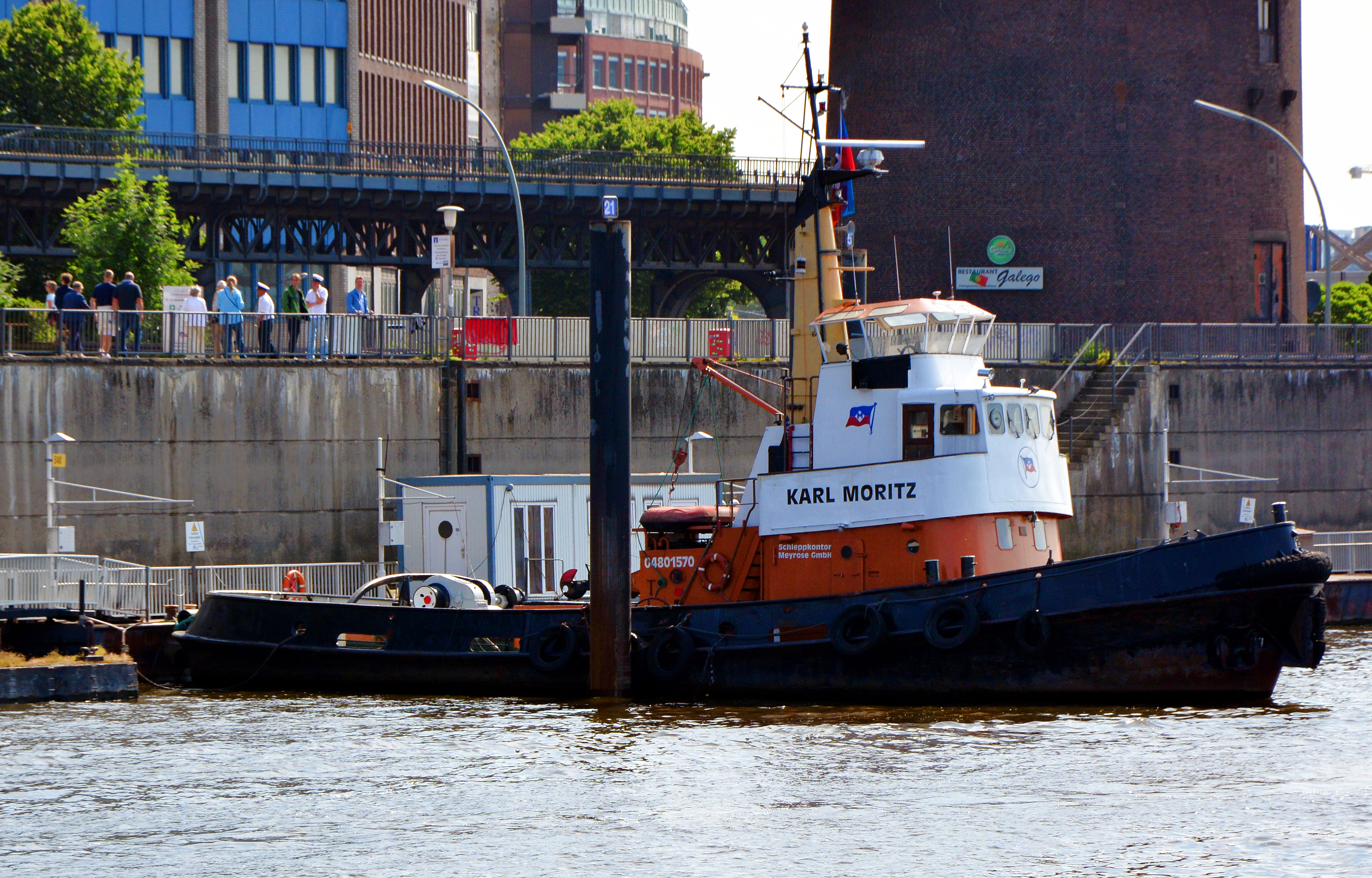 Der Schlepper Karl Heinz ex Fairplay I (1964) im Hamburger Hafen